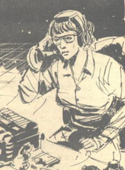 ماجى ماكيلوب -صورة من أسطورة وحش البحيرة